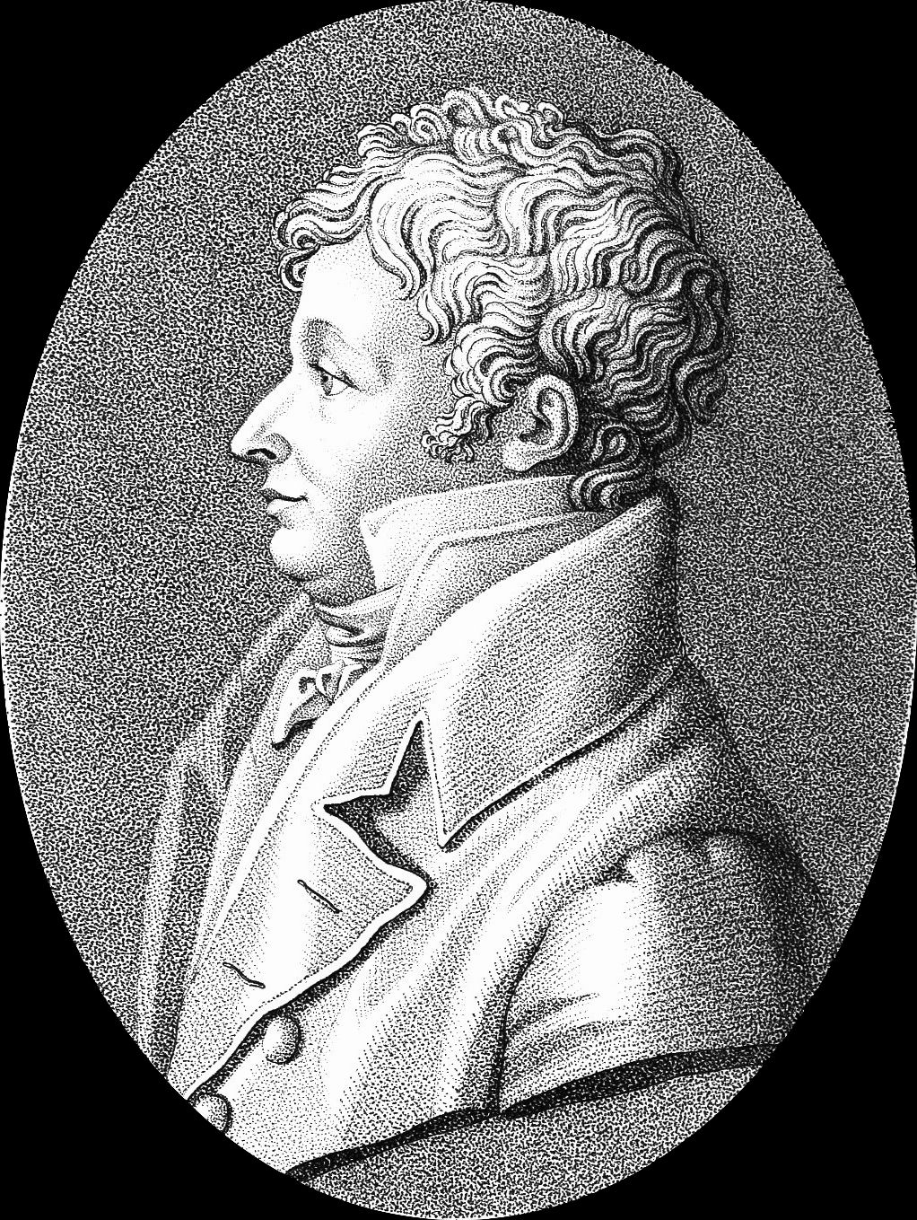 Portrait de Claude Antoine Thory